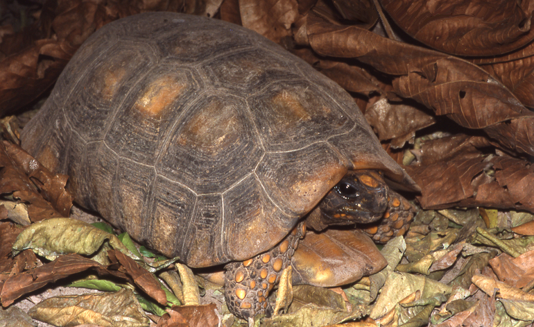 Geochelone denticulata